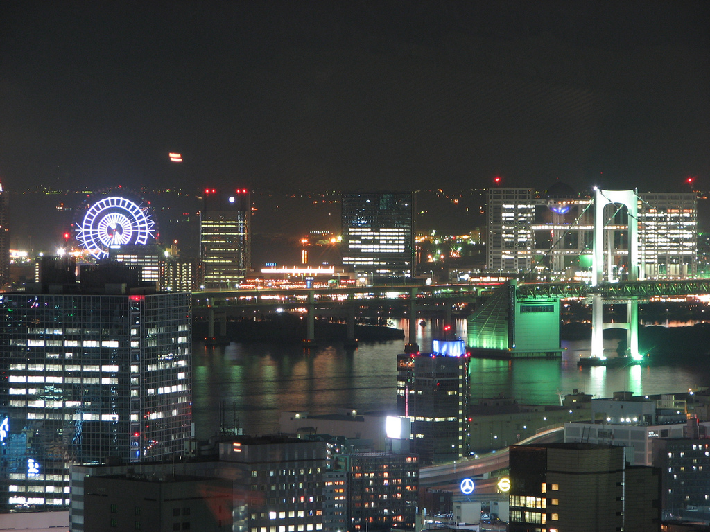 Odaiba night